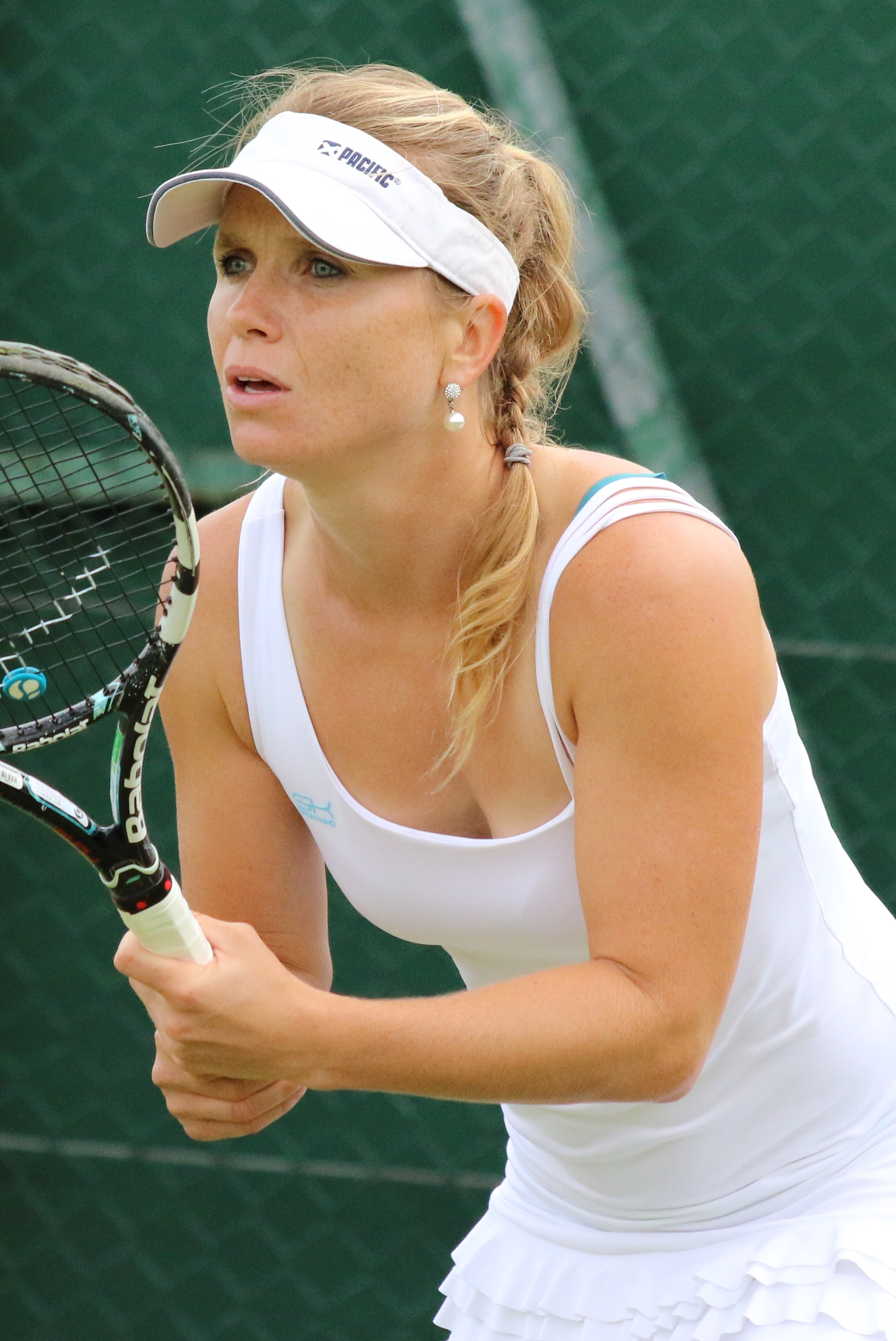 Schaefer WMQ16 (9)